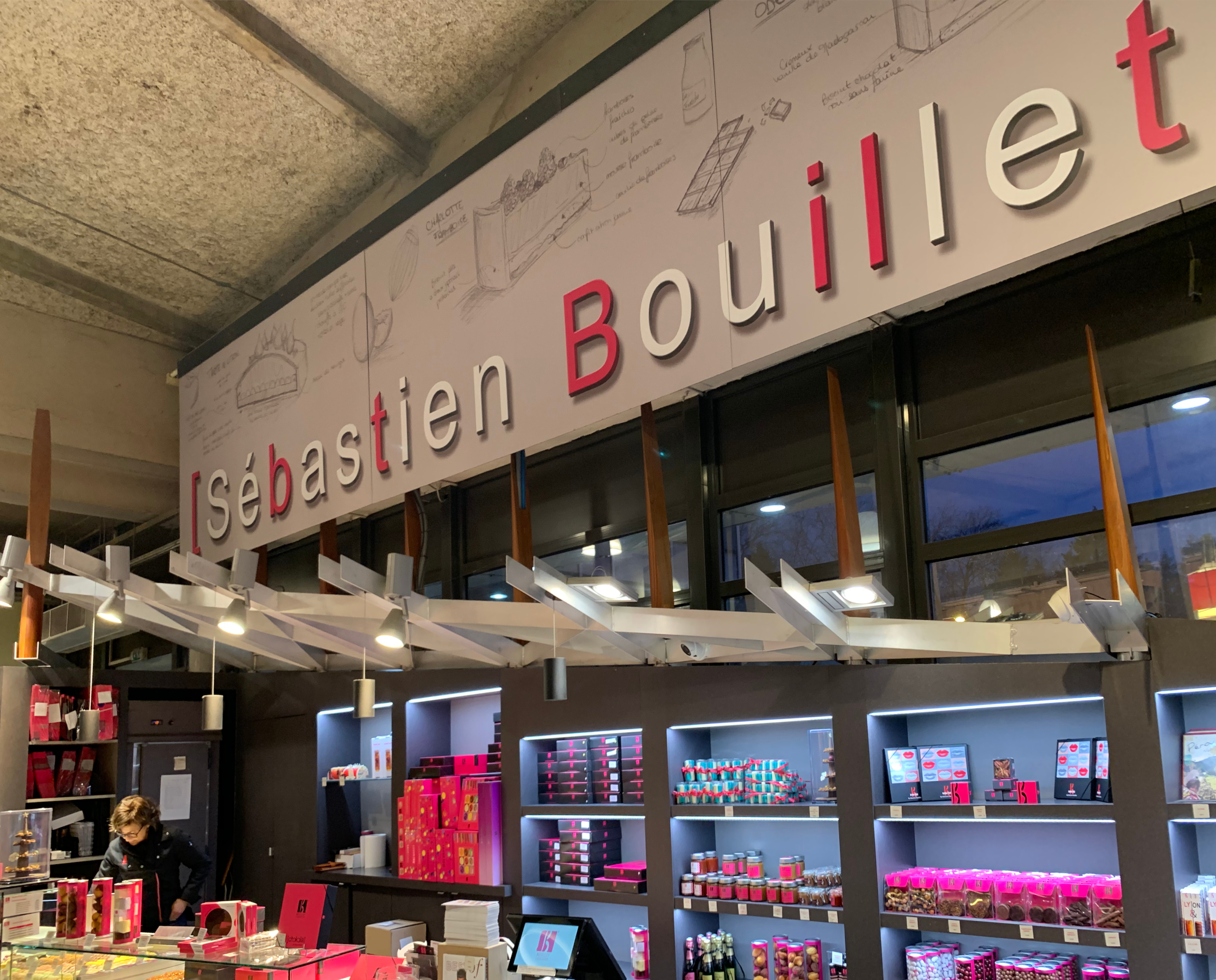 Bouillet Corner Rillieux (janvier 2020).